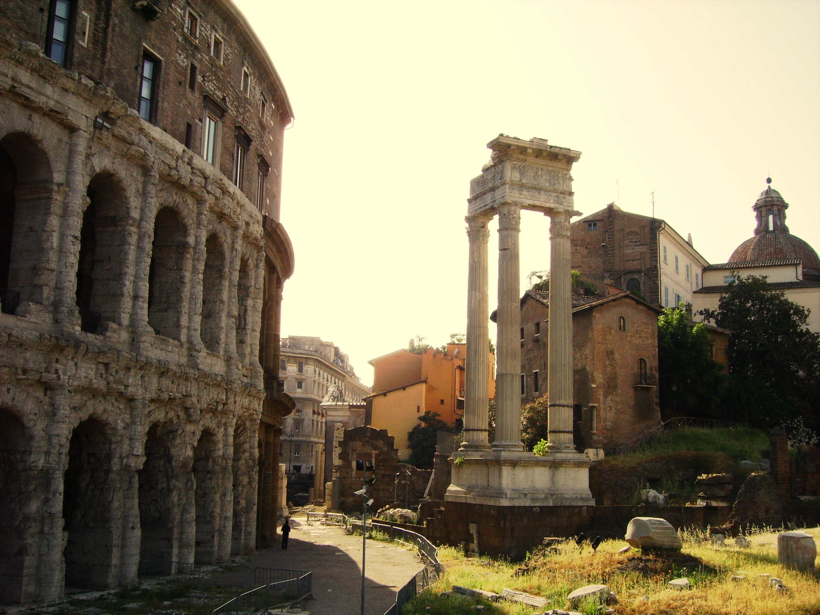 Roma: resti del Tempio di Apollo in Circo, sulla sinistra il Teatro di Marcello, in fondo il Portico di Ottavia.